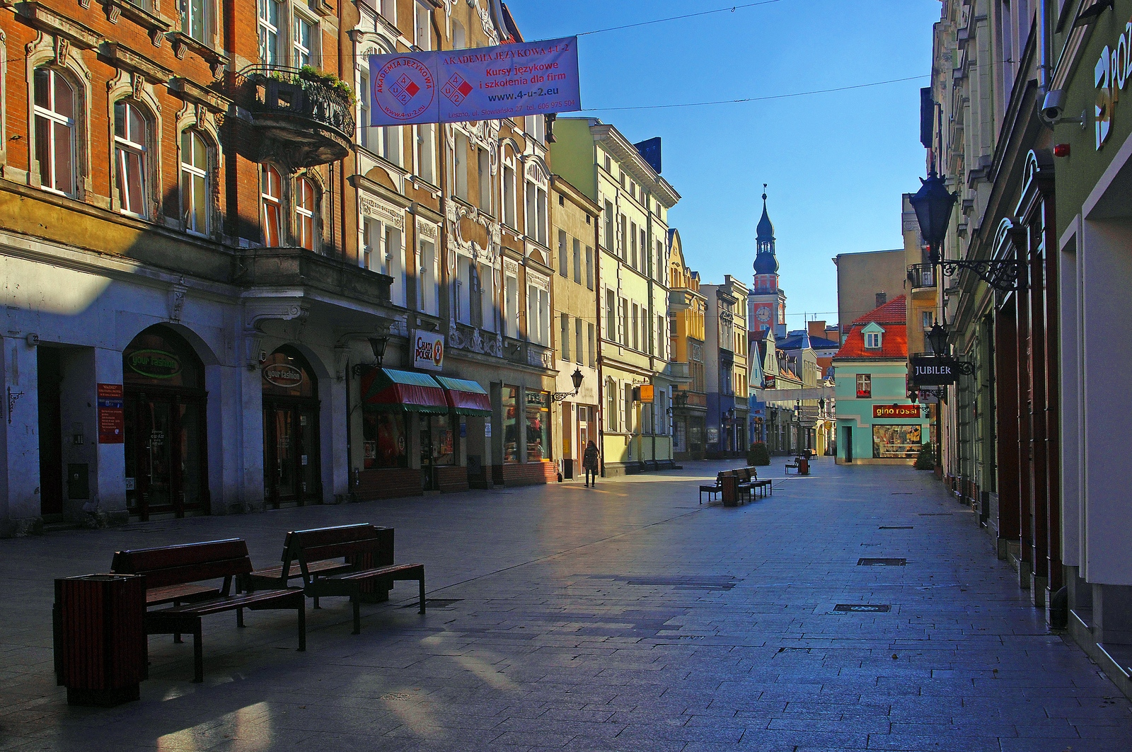 założenie urbanistyczne miasta z XIV-XIX w. Leszno, miasto Leszno